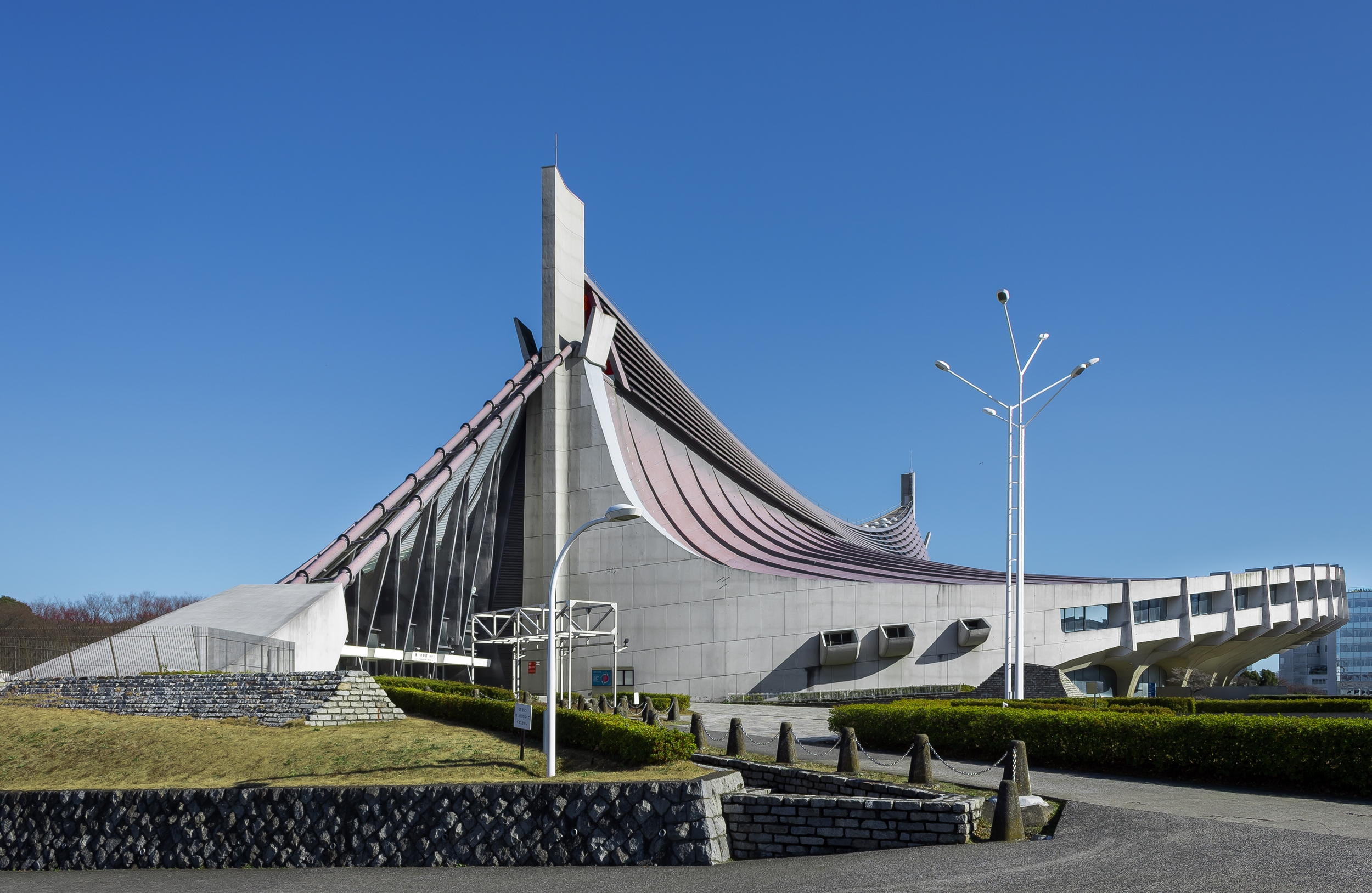 国立代々木屋内総合競技場,第一体育館。丹下健三。